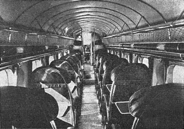 Savoia-Marchetti S.73, kabina cestujících (Světozor, 9.3.1939, No. 10, p. 120 )